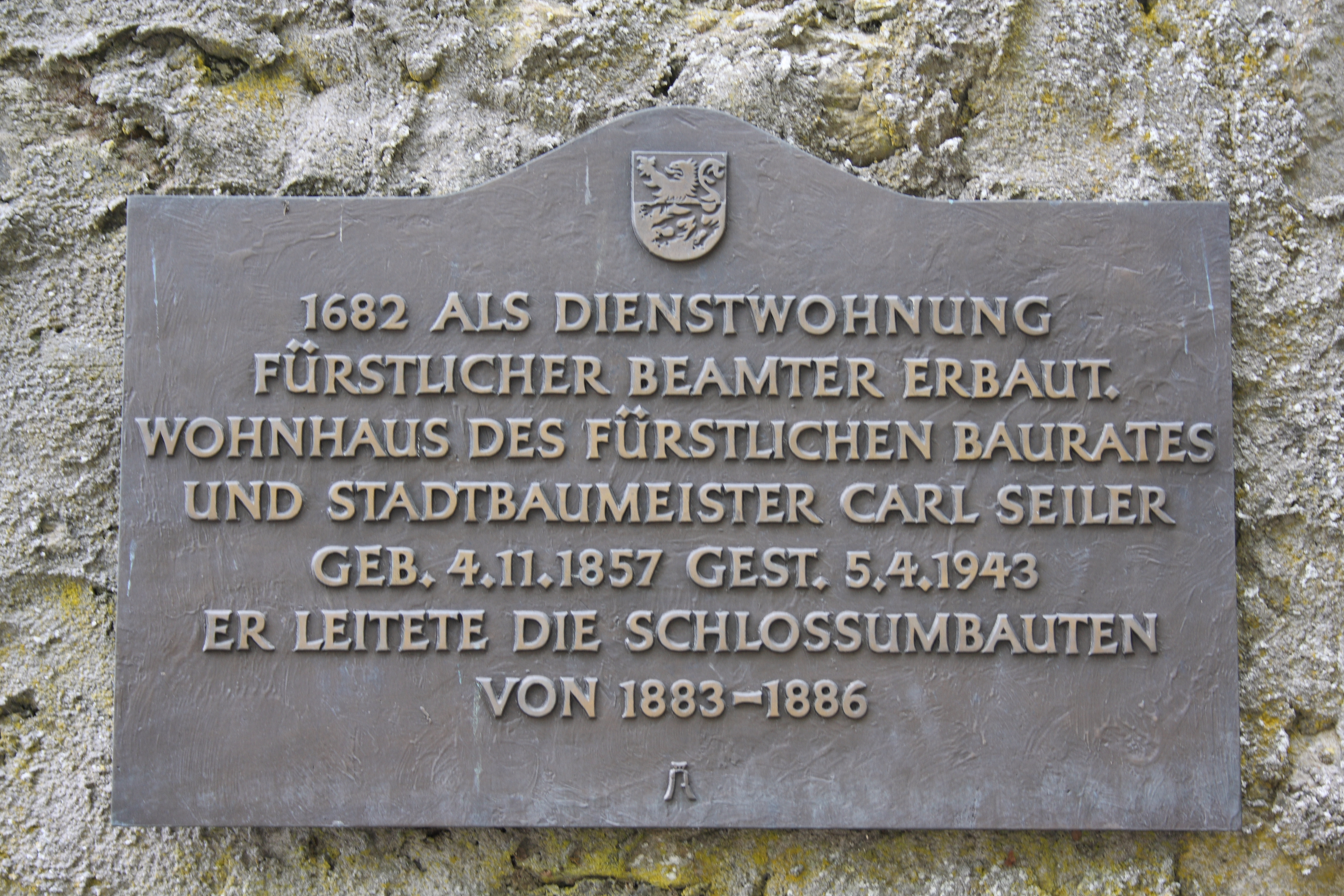 Schloßstraße 15 in Braunfels im Lahn-Dill-Kreis (Hessen)